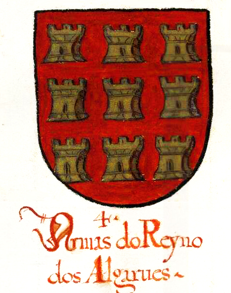 Brasão do Reino do Algarves como patente no folio10 do Thesouro da Nobreza de Francisco Coelho